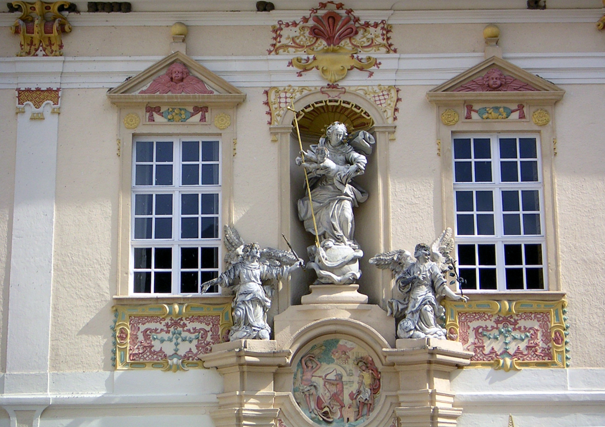 Fassade am Prälatenhof, Stift Zwettl, Niederösterreich.